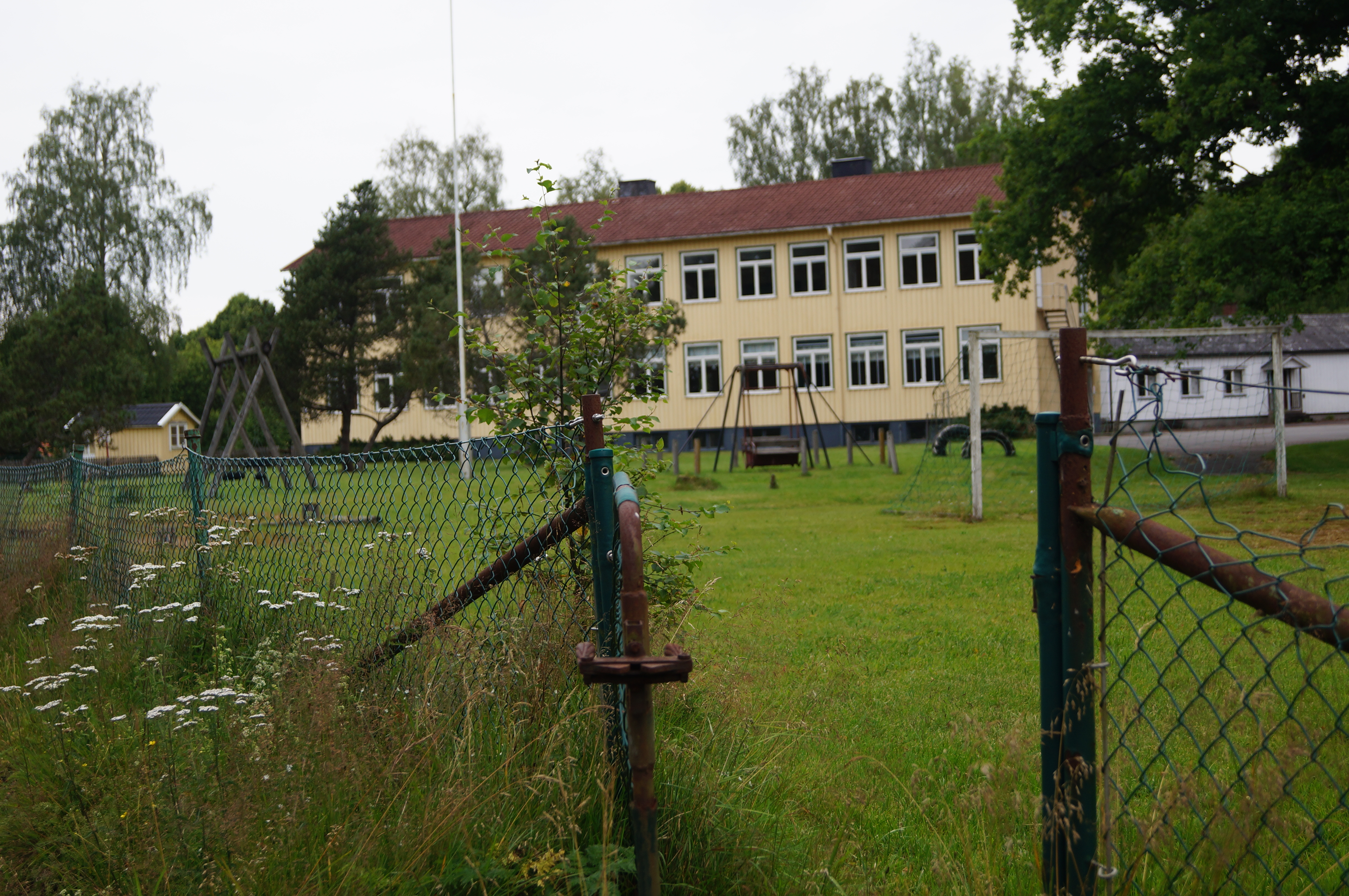 F d skola i Kalv, Svenljunga kommun.